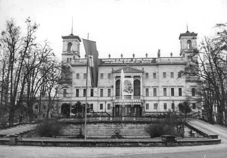 Dresden, Pionierpalast Zentralbild Klein Str-Mü. 3.5.52 Der Pionierpalast in Dresden. Aussenansicht.